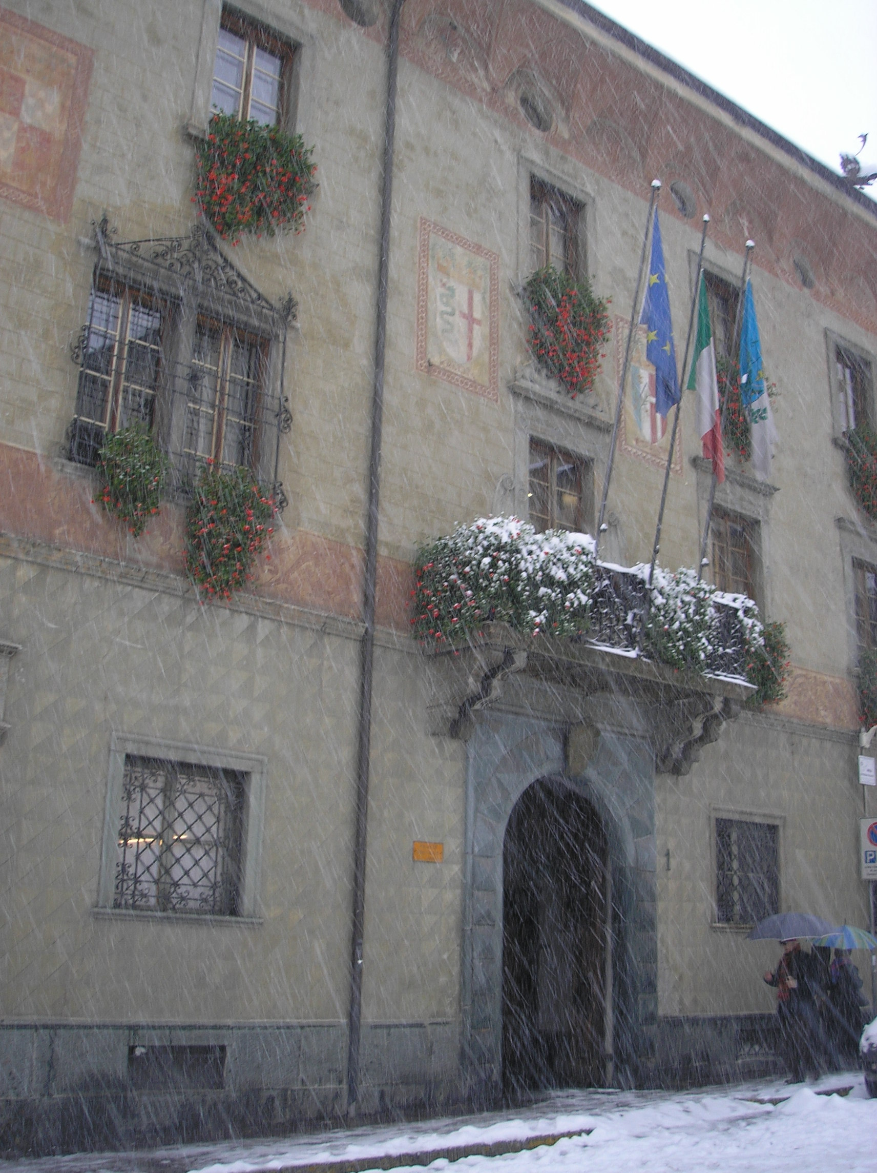 Palazzo del Governo (sede comunale)